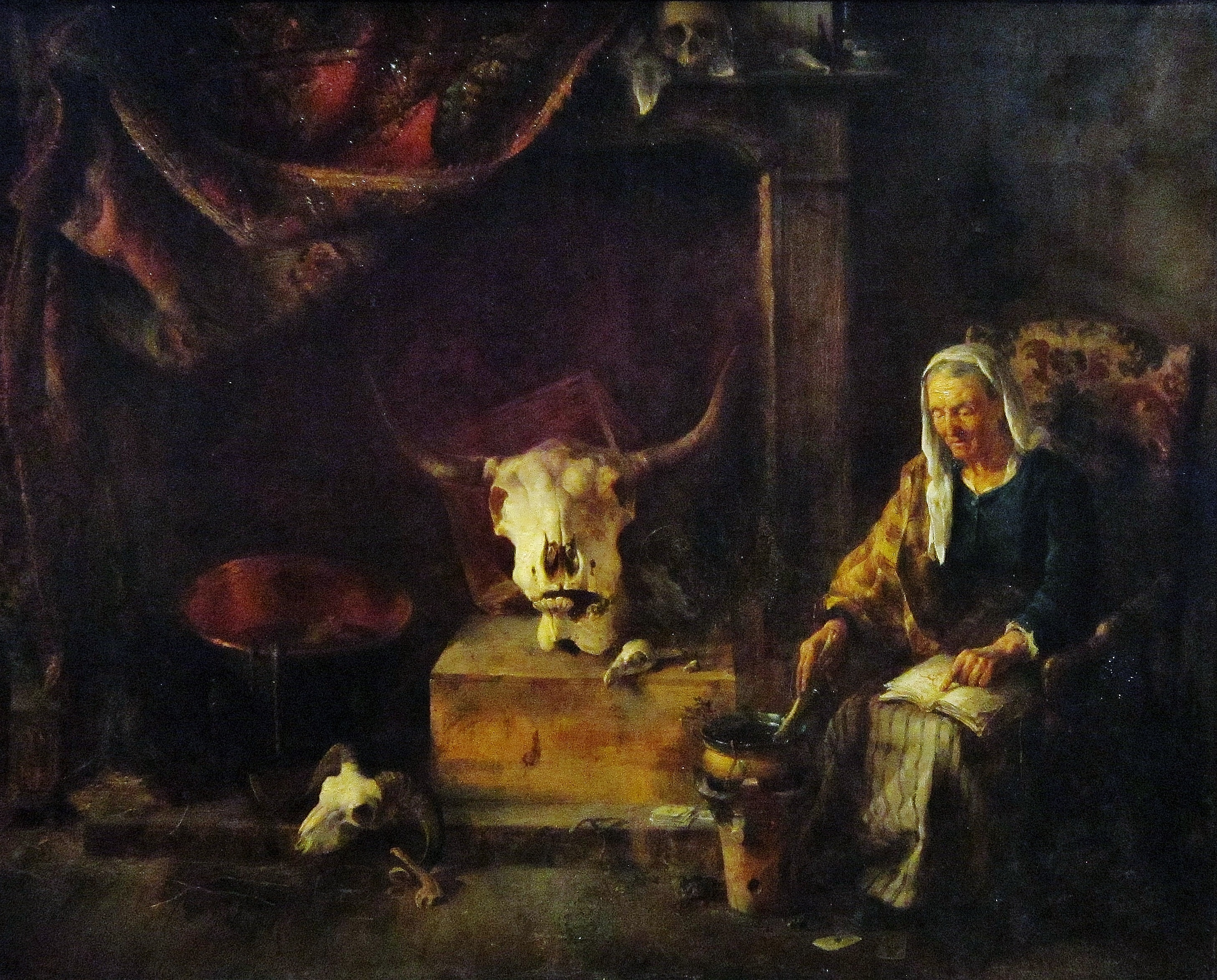 Jacques Raymond Brascassat : La Sorcière (huile sur toile, 1835, Musée des Augustins, Toulouse). Dans cette composition fantaisiste truffée d'anomalies (la tenture, le fauteuil), se tient une vieille femme, incarnation du mythe de la sorcière. Des attributs des pratiques sorcellaires y sont rassemblés ; crâne de bovin, grimoires, chaudron, fioles, cartes..